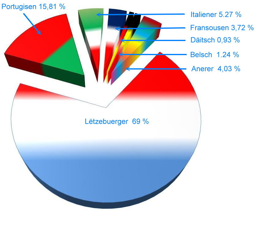 Diddeleng Auslänner.